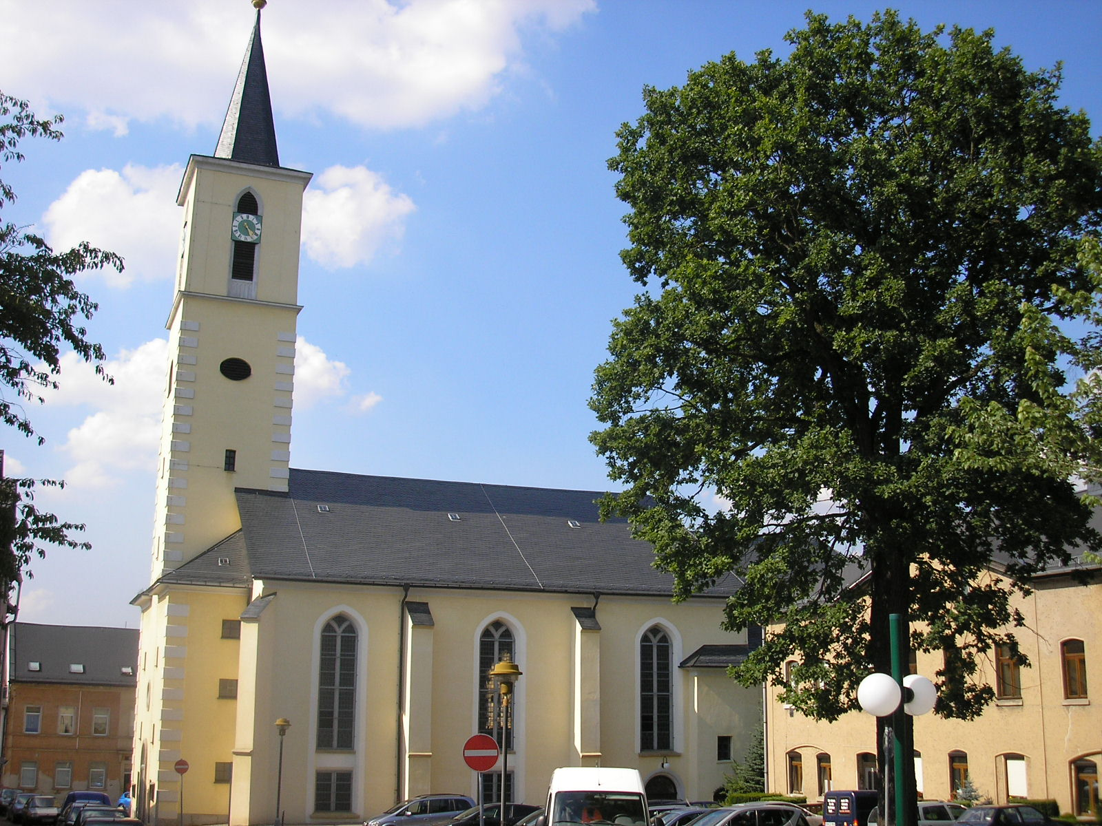 Die Stadtkirche von Schleiz (Thüringen).